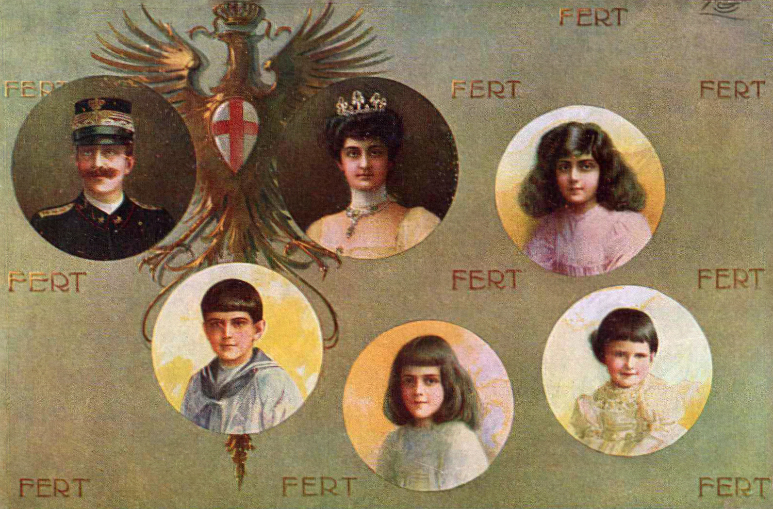 Cartolina riproducente la famiglia reale italiana: Re Vittorio Emanuele III (1869-1947), la Regina Elena (1873-1952), Umberto II (1904-1983), Jolanda (1901-1986), Mafalda (1902-1944) e Giovanna (1907-2000). Non è qui ritratta l'ultimogenita Maria Francesca di Savoia (1914-2001).